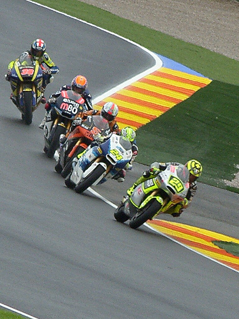 Varios pilotos pelando por una mejor posición